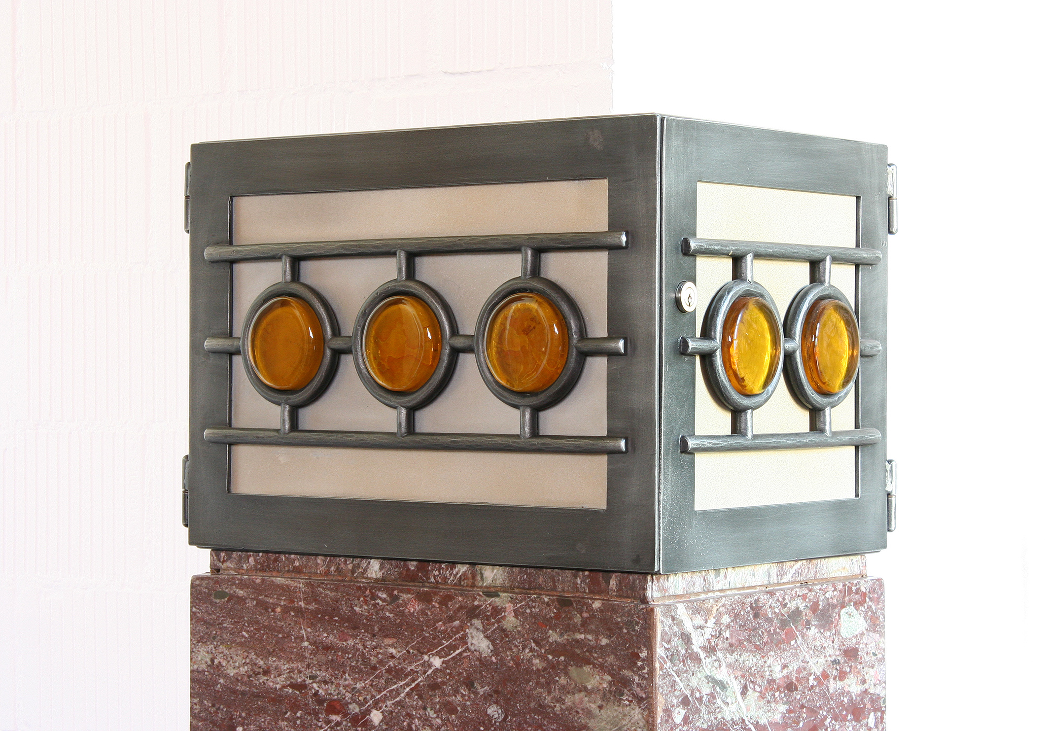 Römisch-katholische Pfarrkirche Bruder Klaus Bäretswil, Innenansicht